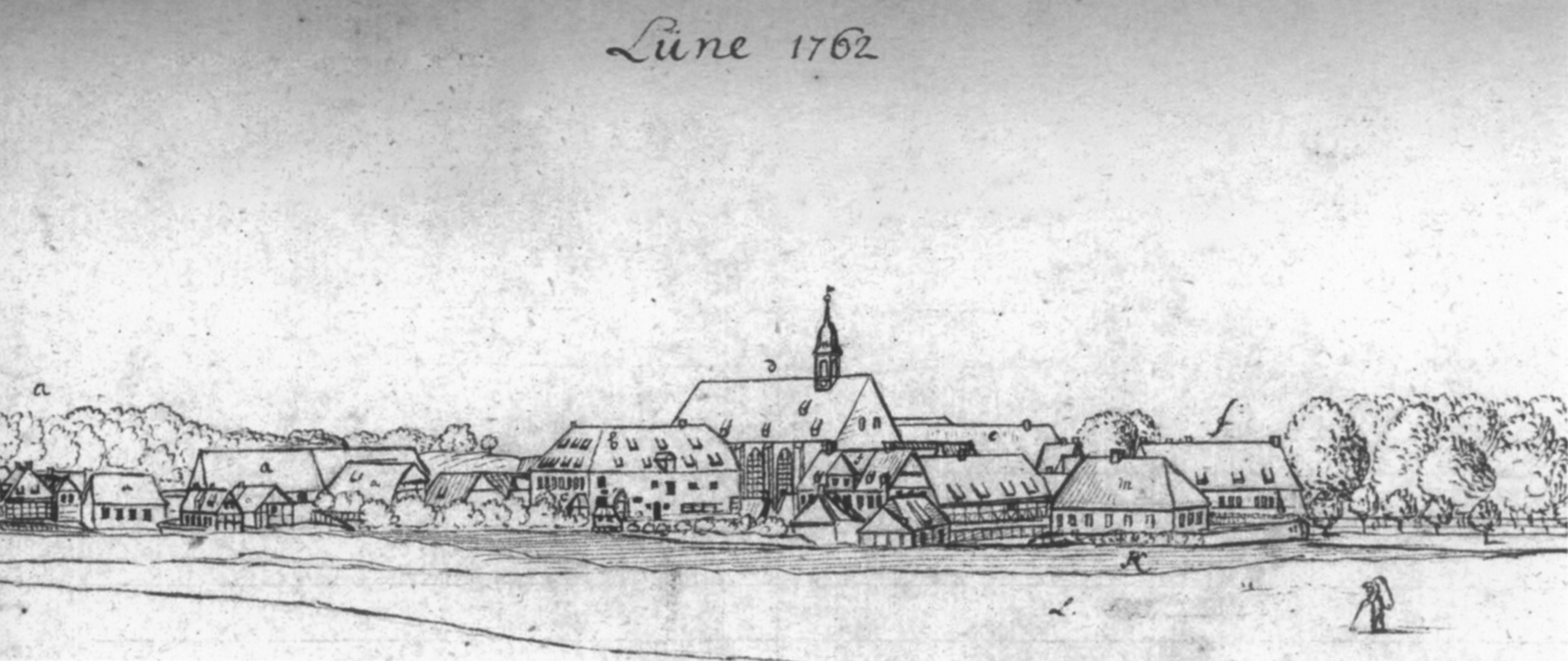 Lüne 1762. Kloster Lüne, Ansicht von Nordwesten, Zeichnung von Ludwig Albrecht Gebhardi (Collectanea), 1762 Gottfried-Wilhelm-Leibniz-Bibliothek, Hannover, Ms. XXIII, 849, Bd. 2, Bl. 397